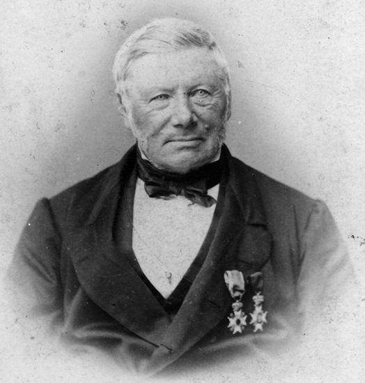 Peter Möller i 1868.